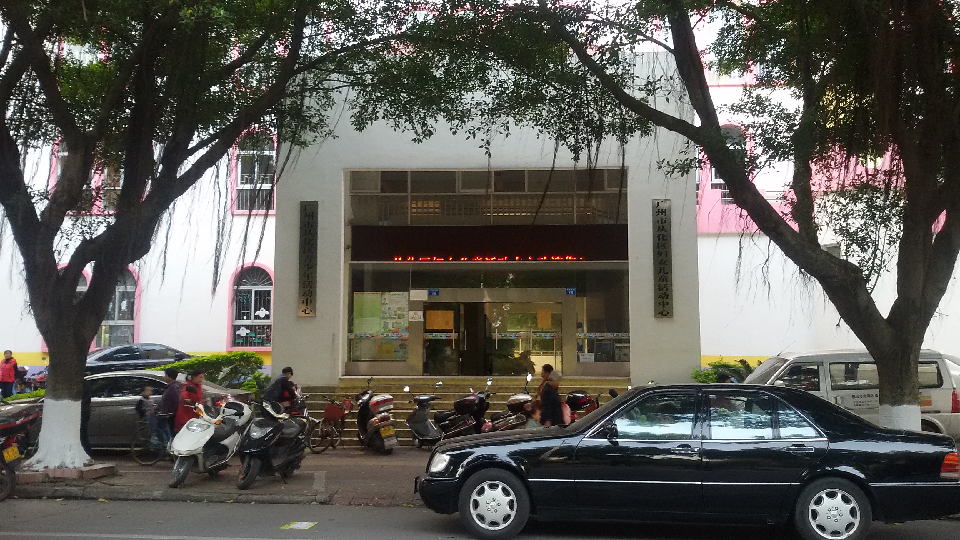 粵語: 從化區婦女兒童活動中心